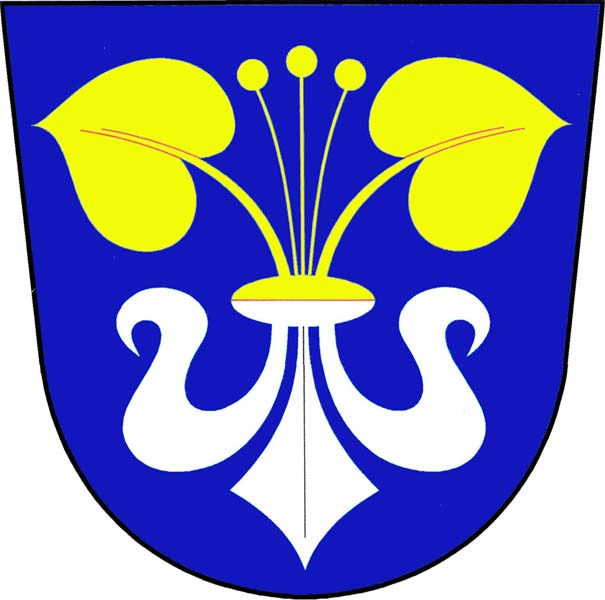 Znak obce Kuřimská Nová Ves